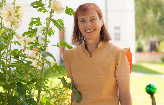 Helene Walterskirchen im Garten von Schloss Rudolfshausen (2014)